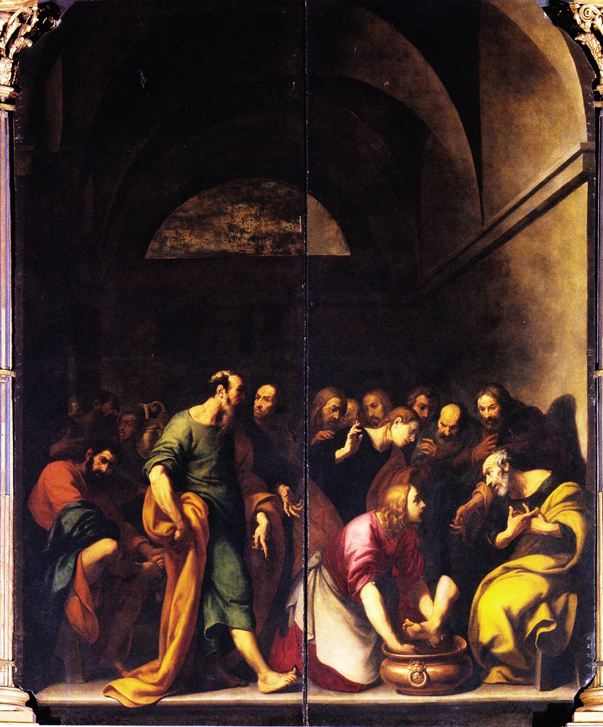 Lavanda dei piedi sull'esterno delle ante dell'organo a sinistra, Capolavori di Daniele Crespi